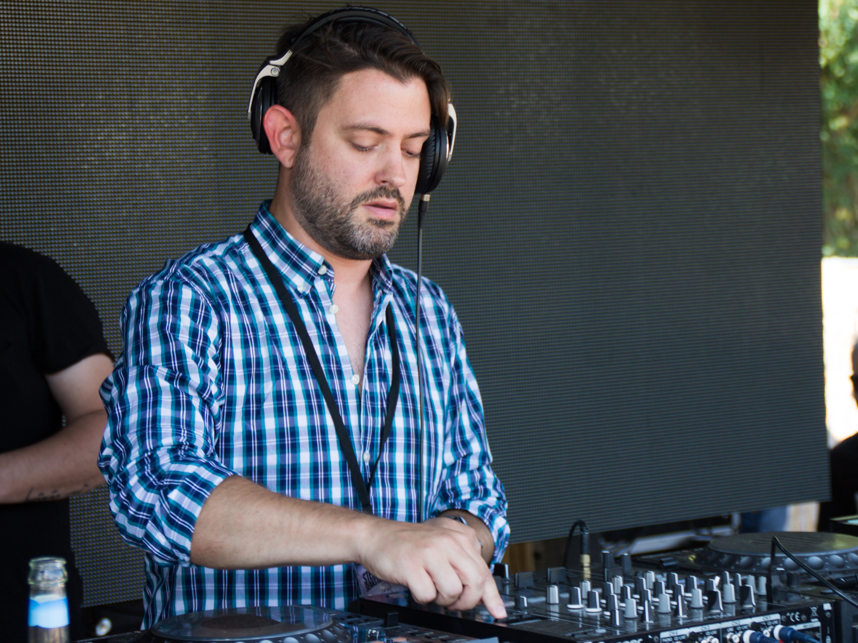 Sébastien Léger - Dieses Bild ist auf dem Sterne & Bass Tages-Festivals vom 9. August 2015 das in Berlin-Rummelsburg entstanden.